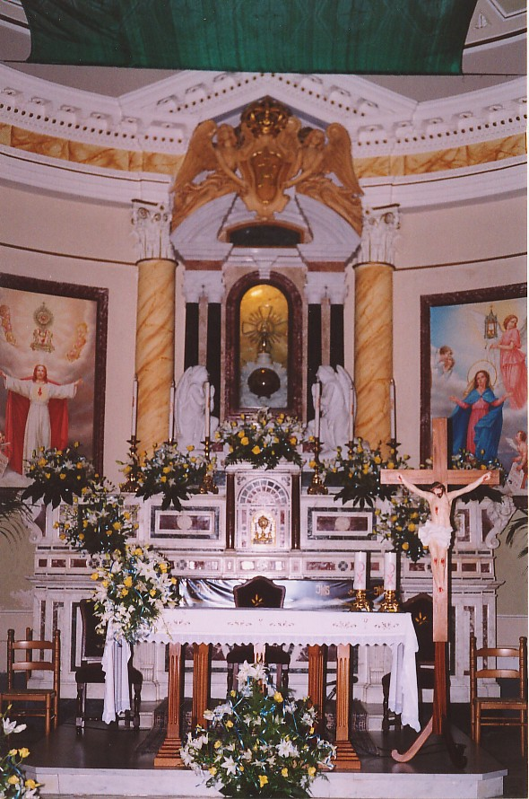 San Mauro La Bruca, chiesa di Sant'Eufemia; interno, altare maggiore.